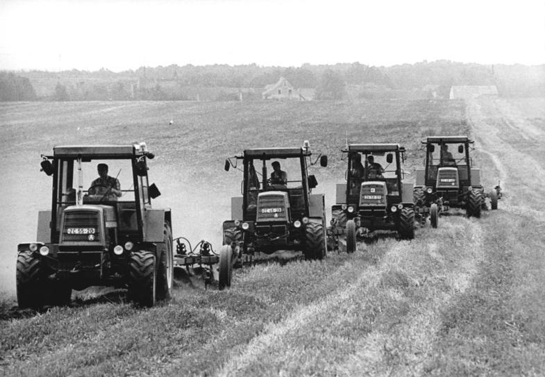 LPG Wittichenau, Vorbereitung der Aussaat ADN-ZB Weisflog 12.8.89-B Bezirk Cottbus: Nach Getreideernte nun der Bodenumbruch. Sofort nach der Getreideernte und der Strohbergung sind die Genossenschaftsbauern der LPG (P) Wittichenau darangegangen, den Boden umzubrechen und für den Futtermittelanbau vorzubereiten.